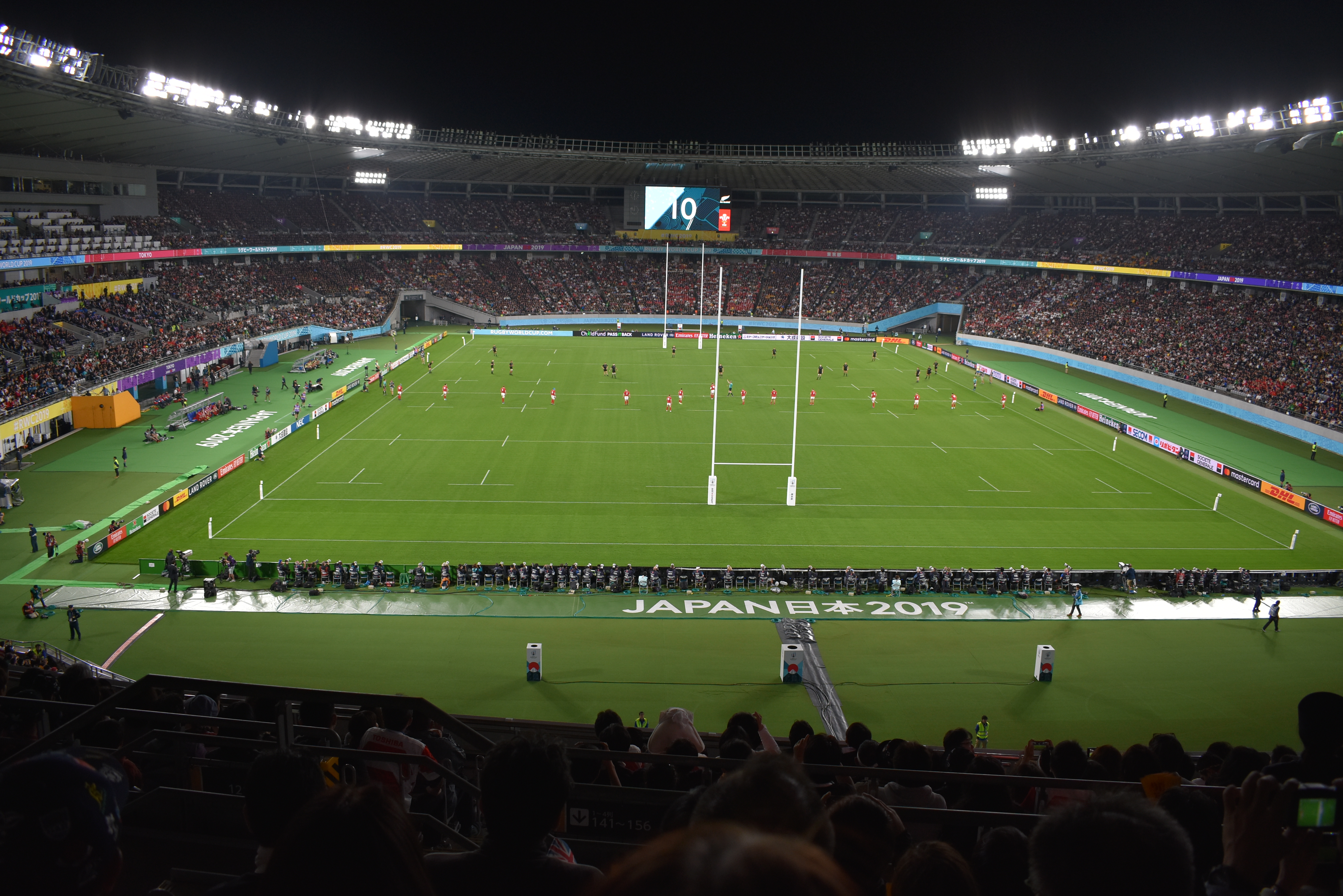 ラグビーニュージーランド代表